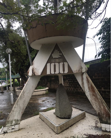 Batu Seratus Tahun atau dikenali sebagai Batu Bersumpah